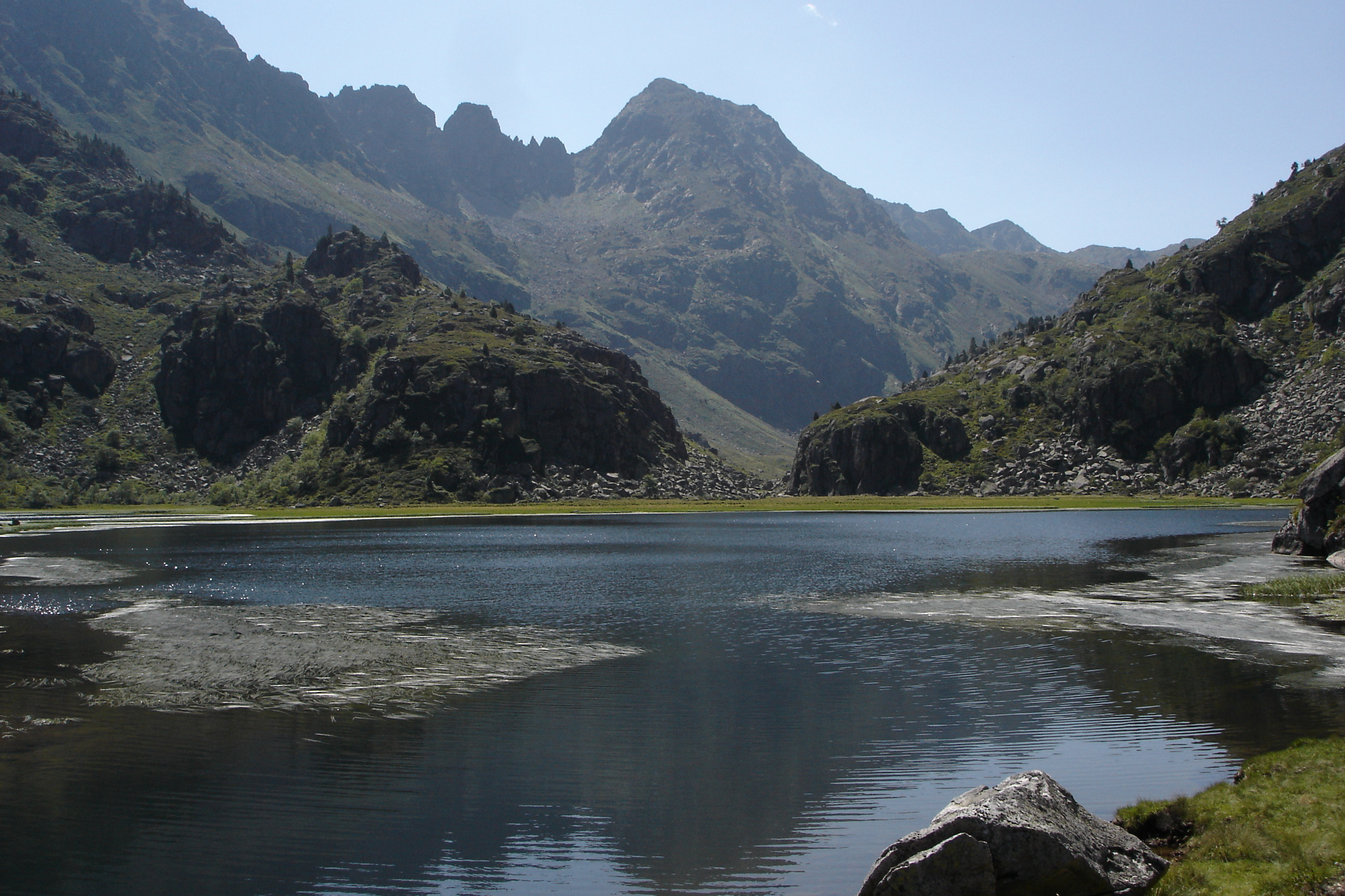 Vallon de et étang de Peyregrand, en Haute Ariège.